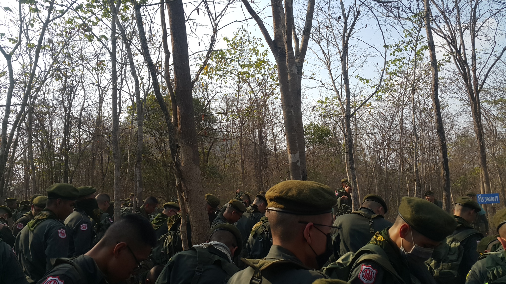 การฝึกภาคสนามที่เขาชนไก่ของ นักศึกษาวิชาทหาร รักษาดินแดน ชั้นปีที่ 3 ภาพนี้ถ่ายในการฝึกเดือนกุมภาพันธ์ 2019 ผลัดที่ 30